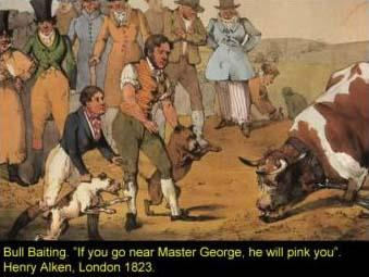 Bullbaiting